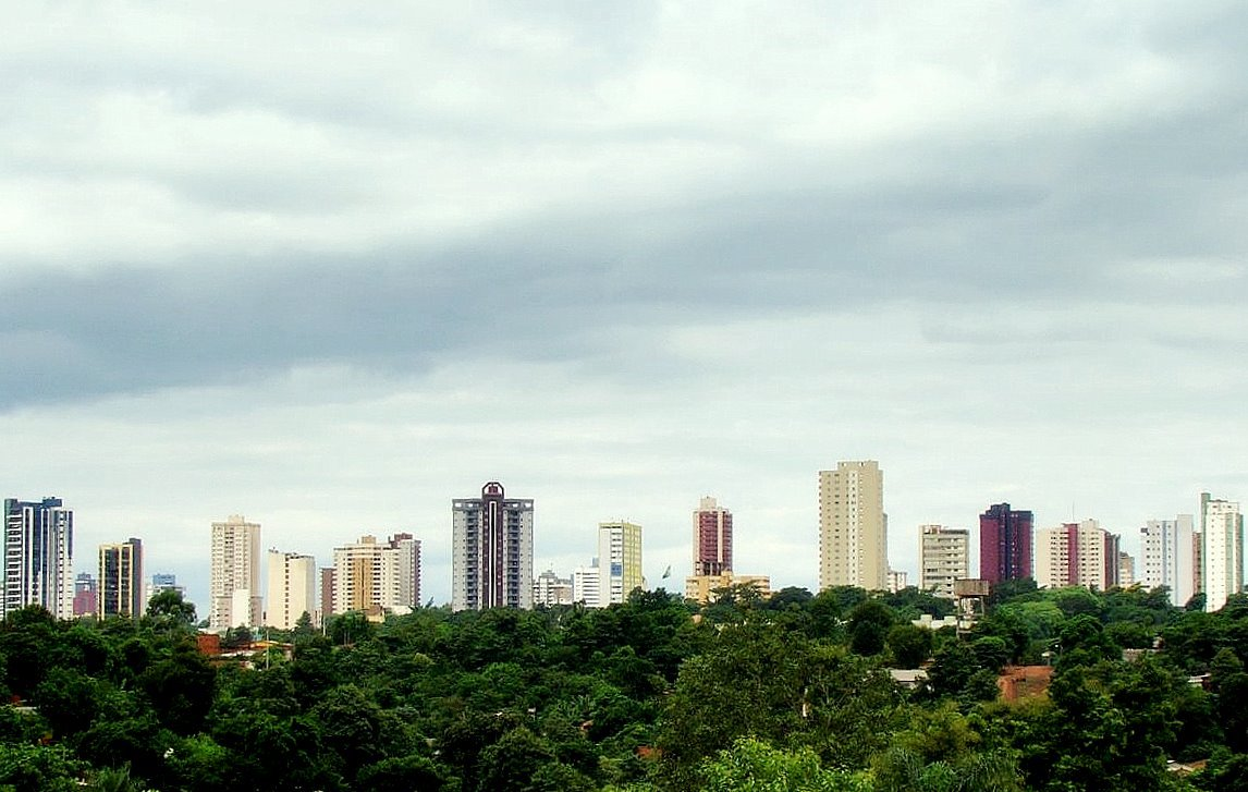 Skyline do município de Foz do Iguaçu, Paraná, sul do Brasil, visto a partir do Rio Paraná (divisa com o Paraguai).